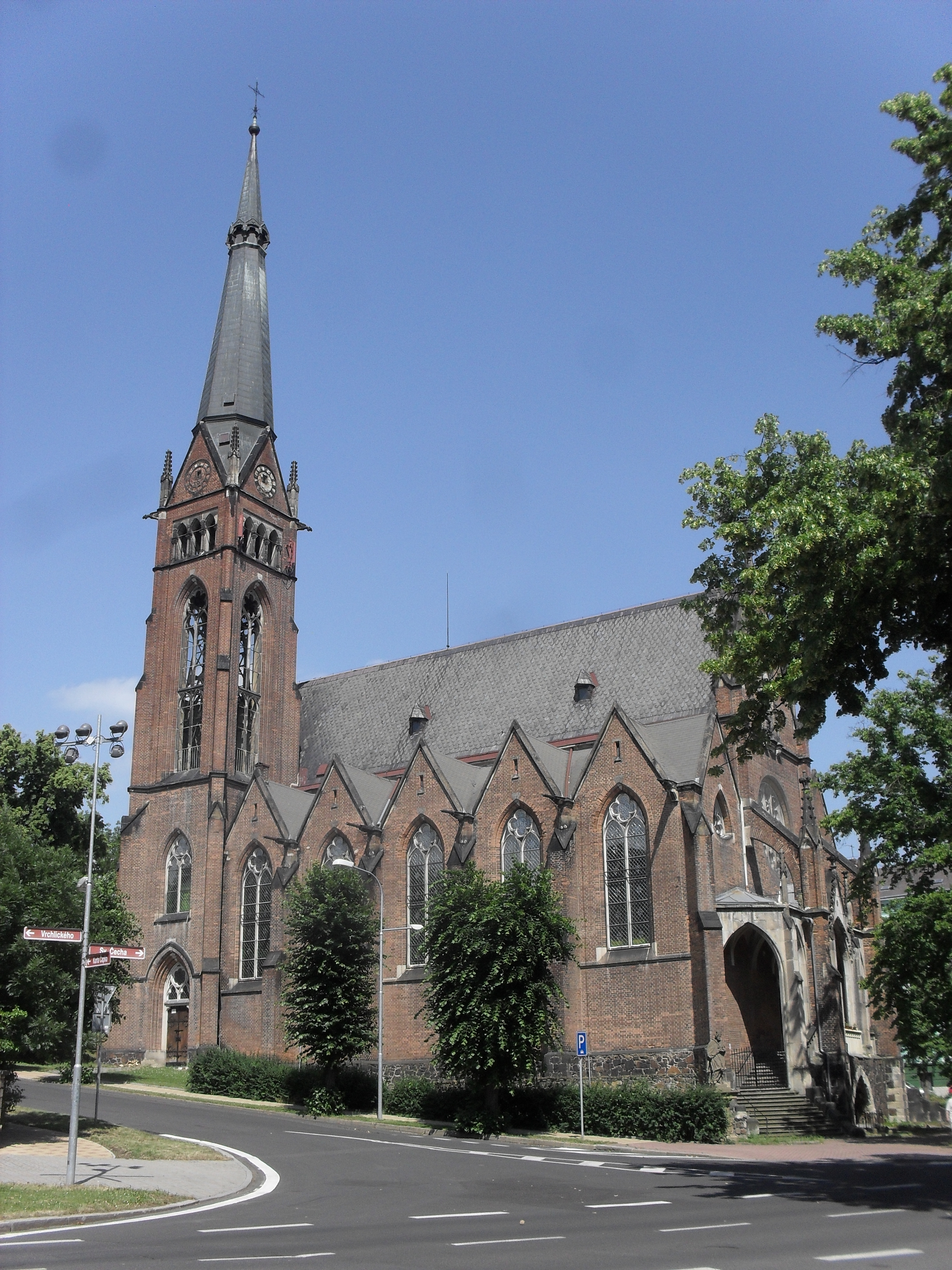 Kostel sv. Alžběty (Teplice)- Ulice: Karla Čapka